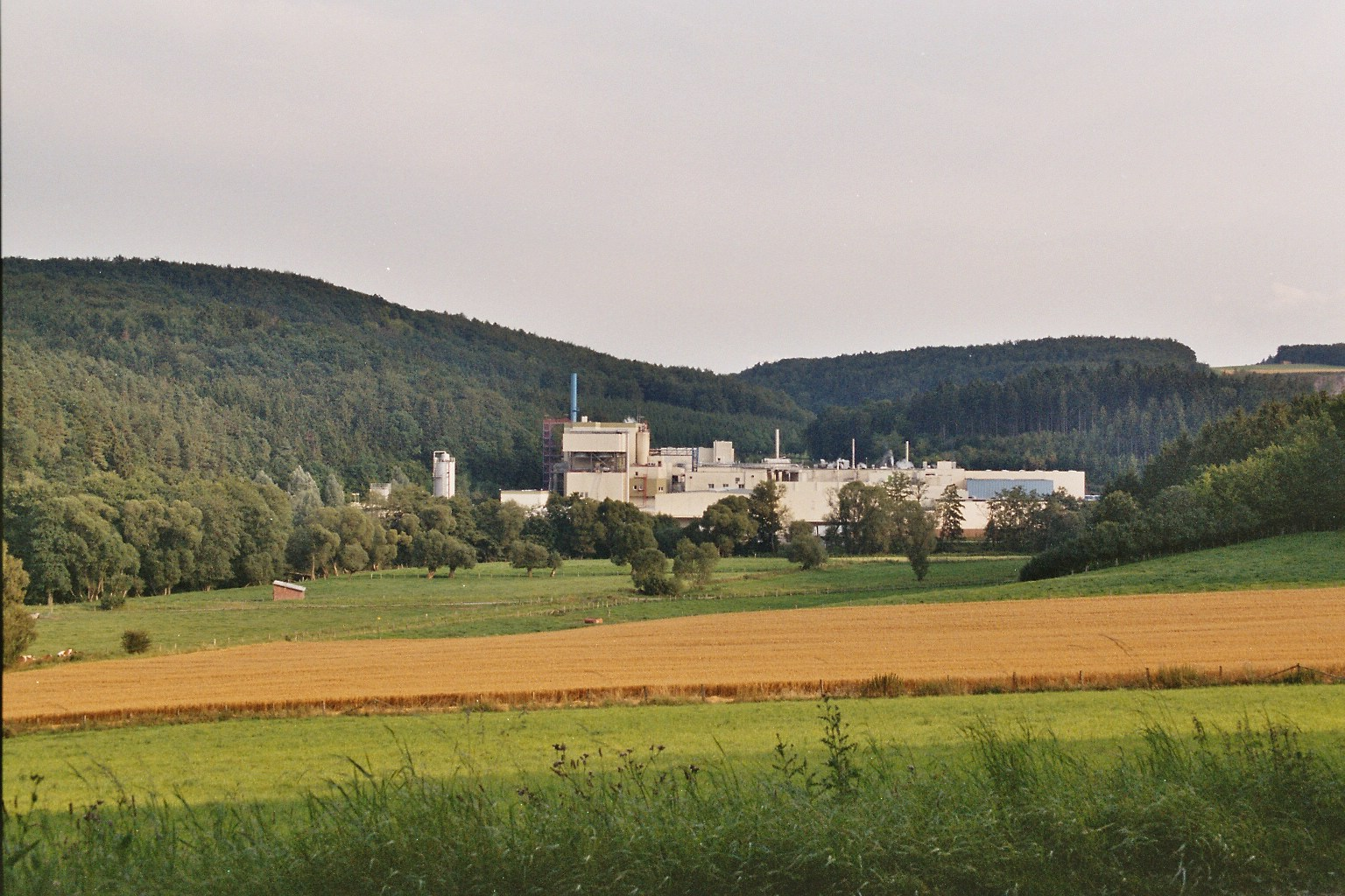 WEPA (Westfälische Papierfabrik), papermill in Marsberg-Giershagen, Flussaue bis zur Wepa Papierfabrik gehört zum Naturschutzgebiet Unteres Diemeltal, NRW, Germany